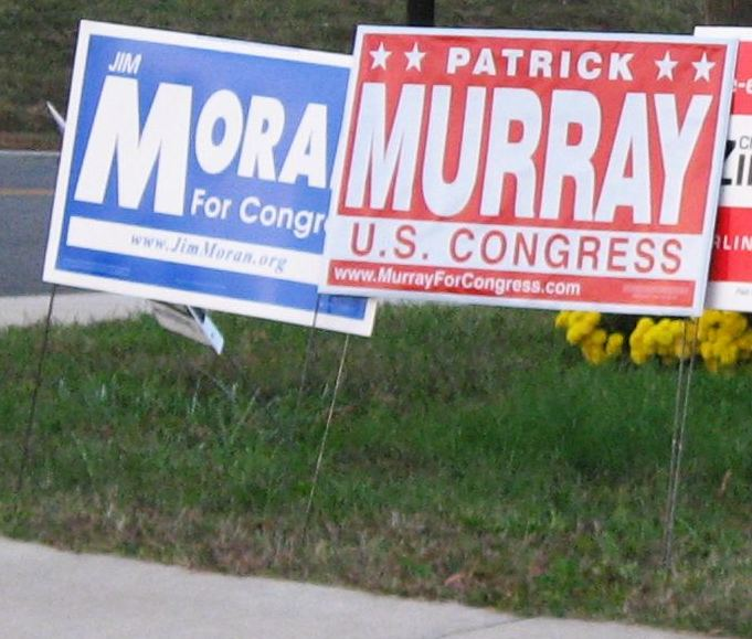 I voted, did you?